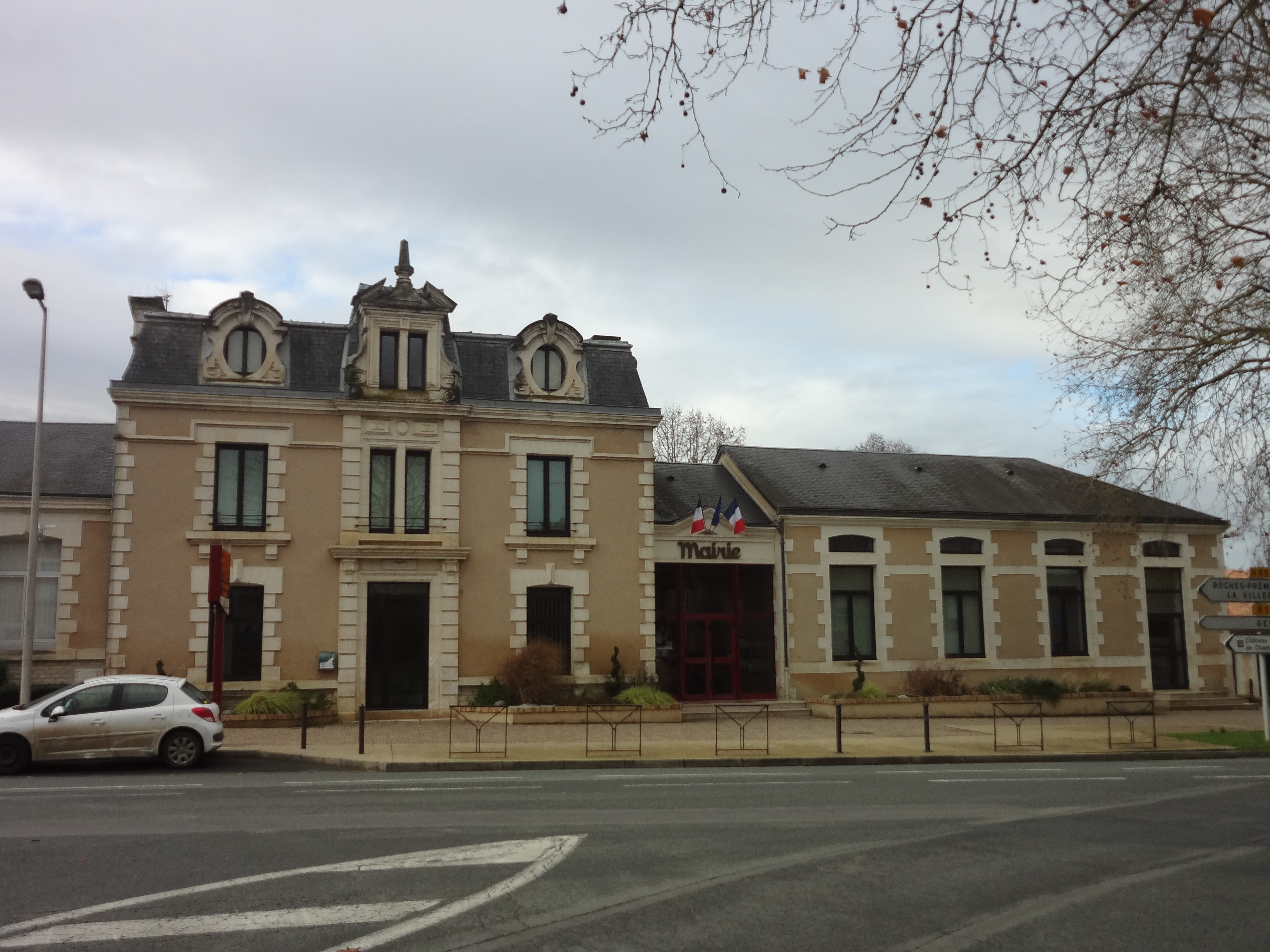 Bâtiment de la mairie, avec corps central et deux ailes